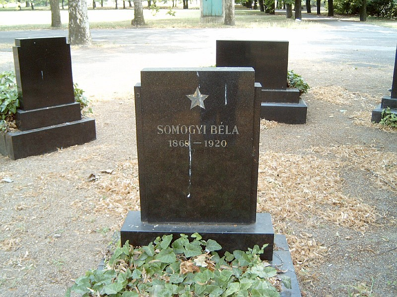 Somogyi Béla (Halastó, 1868. máj. 16. – Újpest, 1920. febr. 17.) tanító, újságíró sírja Budapesten. Kerepesi temető: 20-sziget.